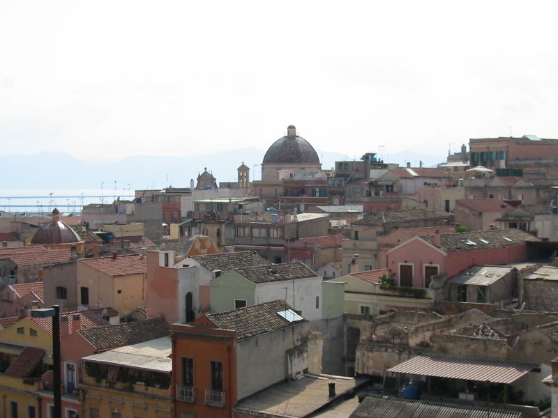 Panorama of Cagliari, Italy